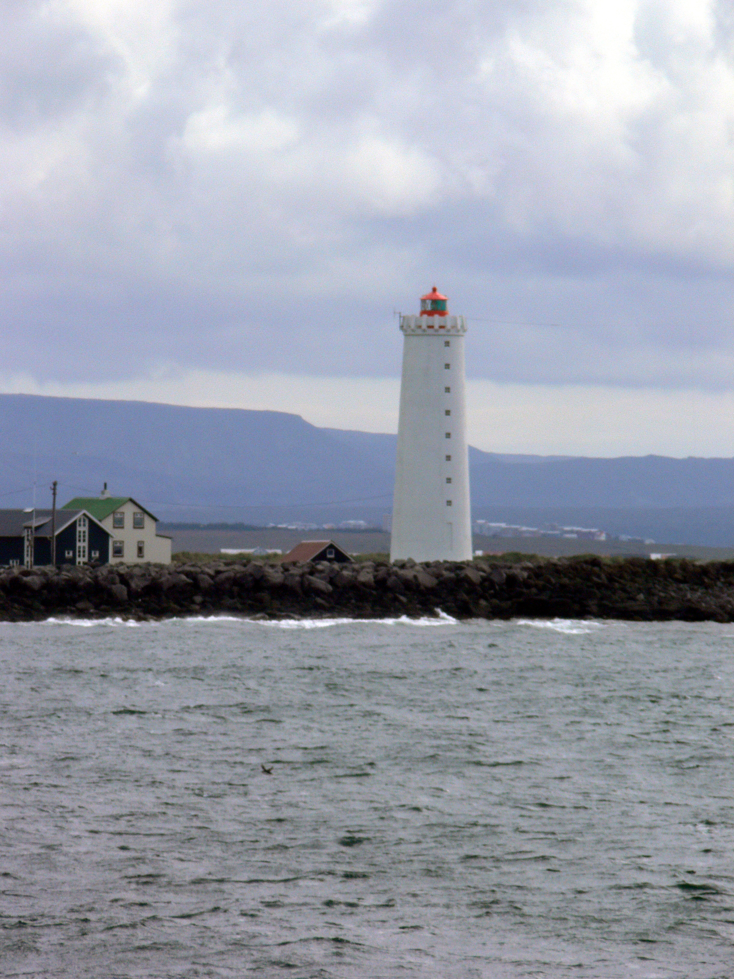 Der Leuchtturm Grótta in Seltjarnarnes.